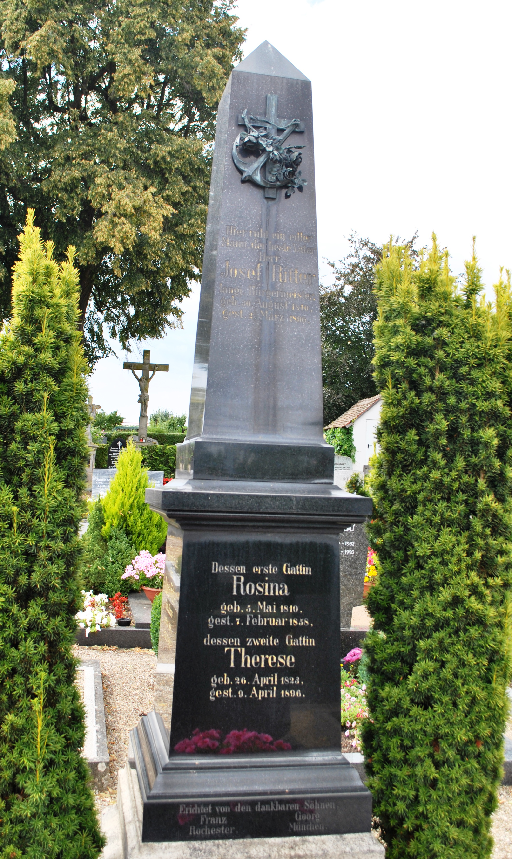 Stele der Familie Ritter, Friedhof Astheim